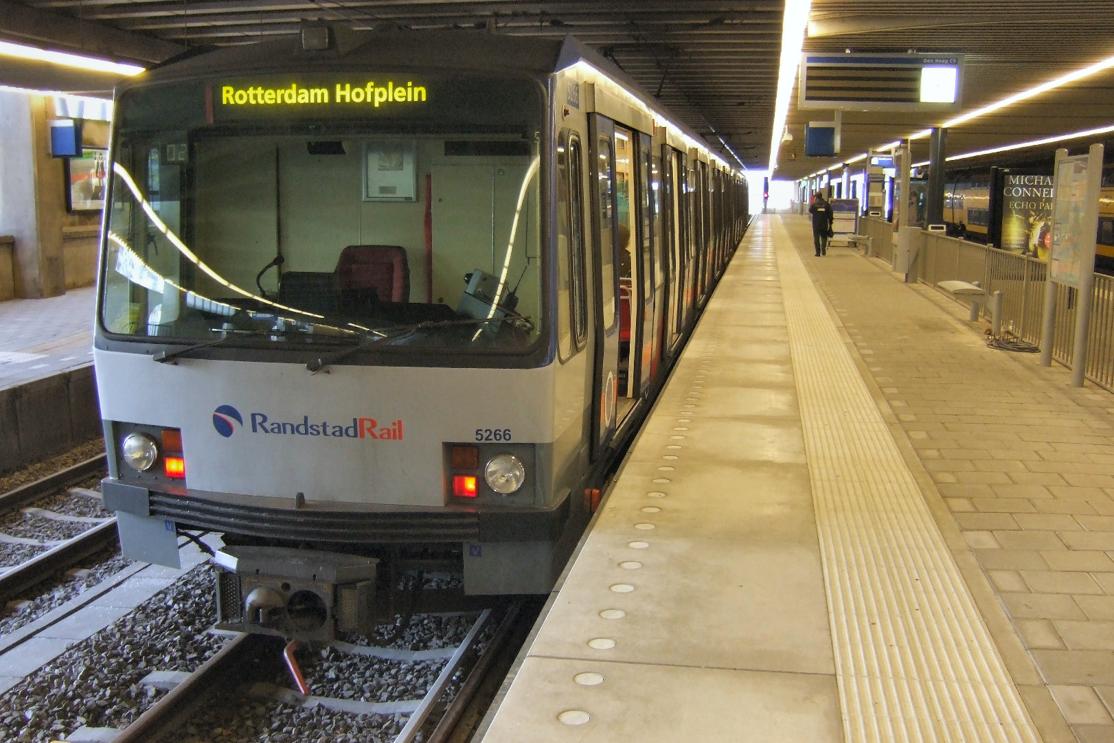 Rotterdams metrostel op Den Haag Centraal.